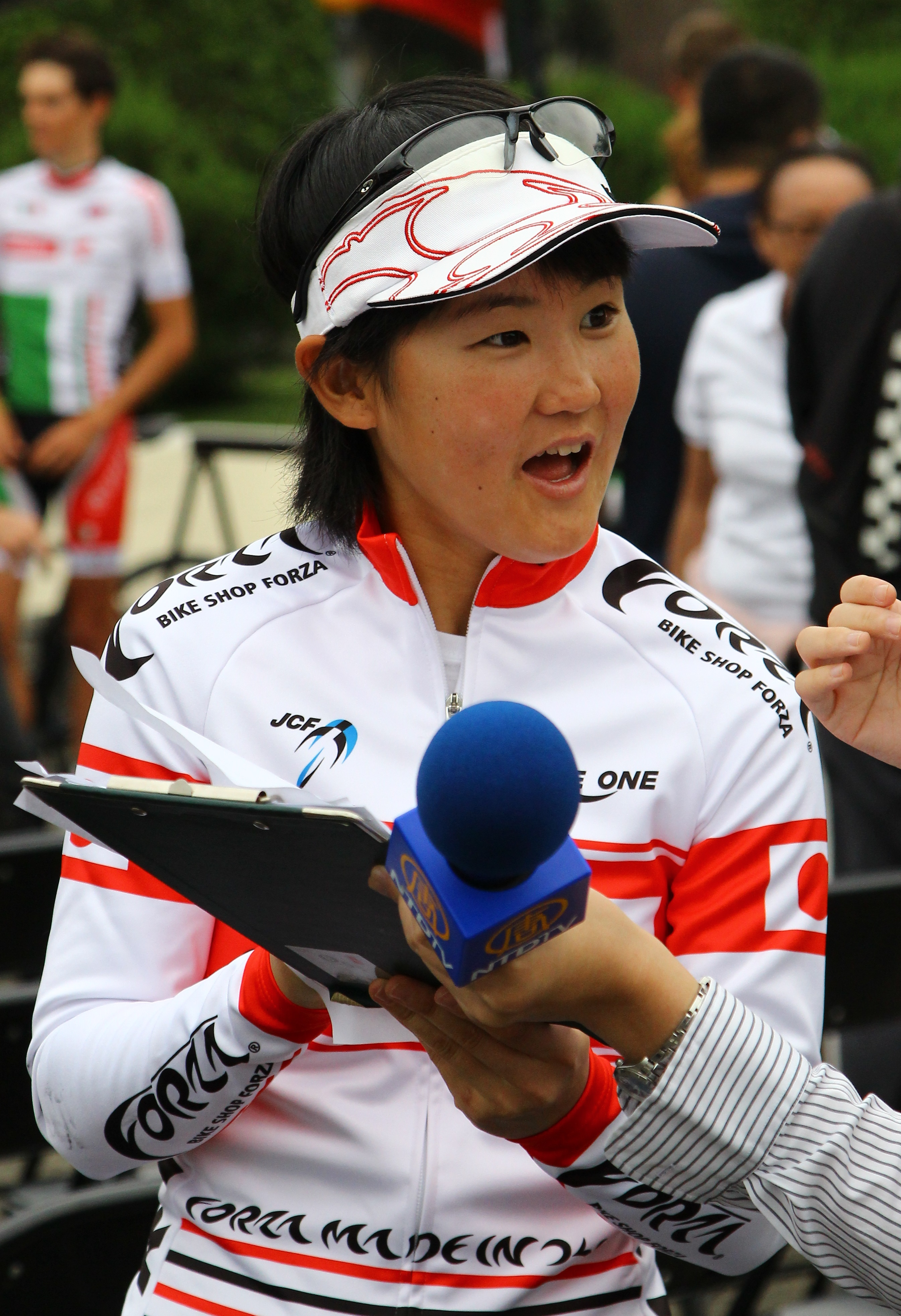 台北市國父紀念館